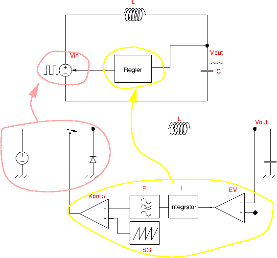 (Prinzip Voltage Mode DCDC-Wandler)